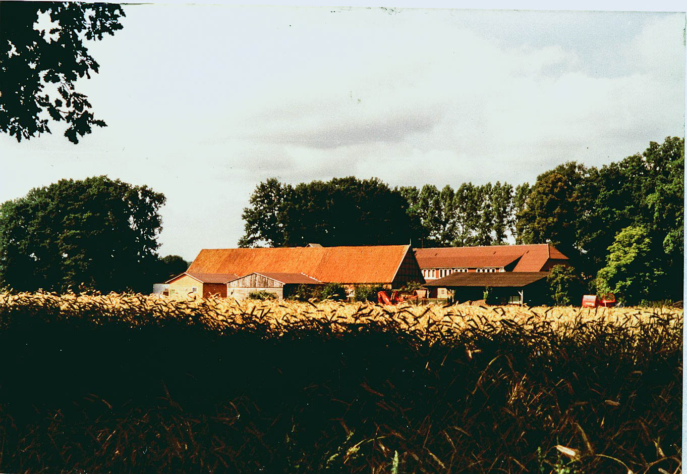 Nievelitz, von der B 191 kommend (1985)